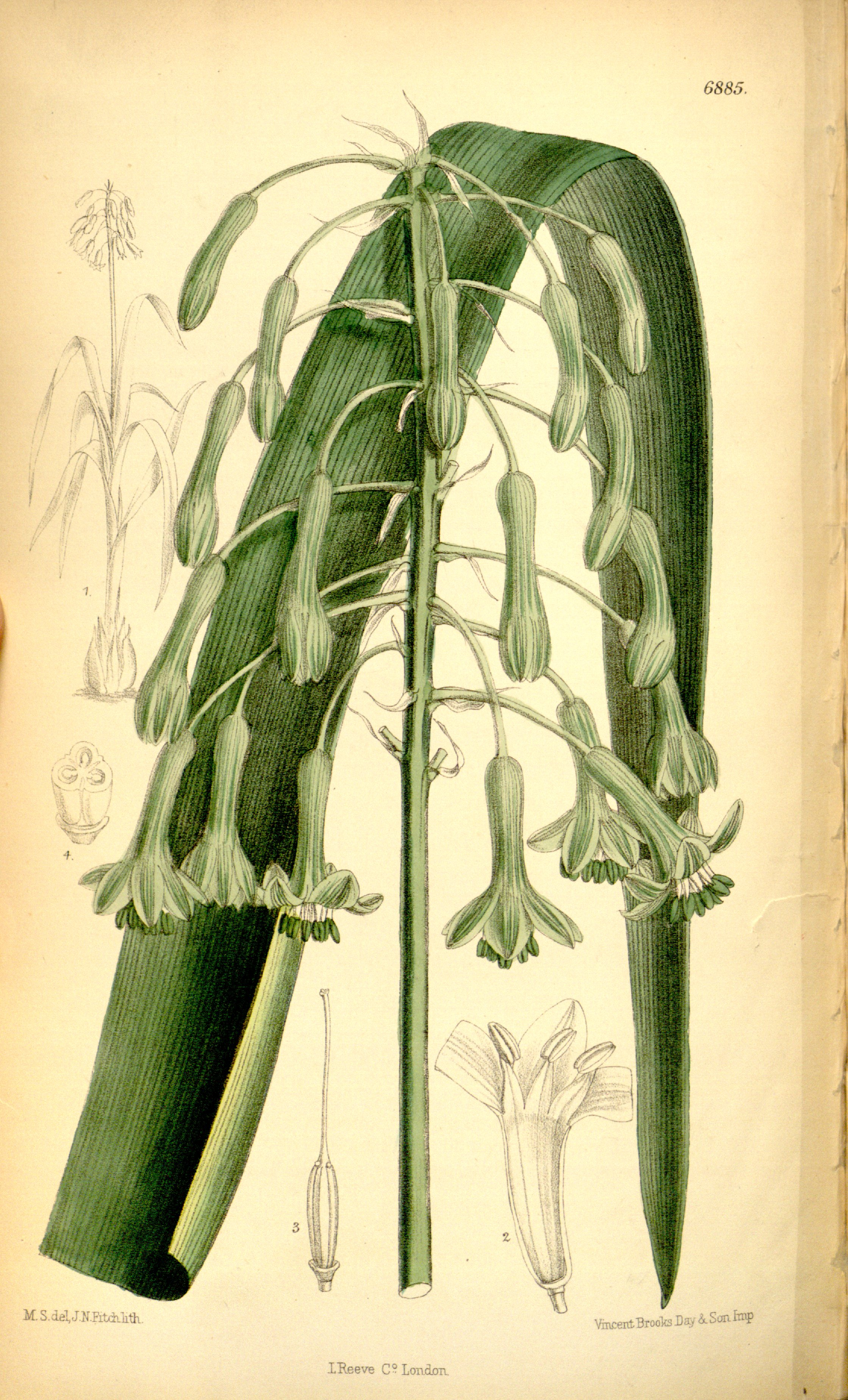 Pseudogaltonia clavata